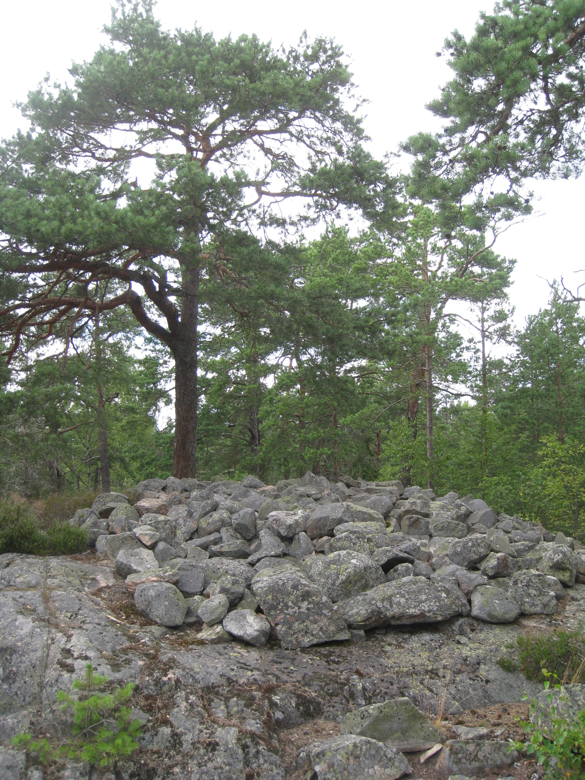 Bronsåldersröse i Ålstensskogen inom Smedslättens område i Bromma väster om Stockholm. Röset är beläget på ett krön av moränbunden bergrygg i Ålstensskogen nordväst om Solviksbadet. Röset, som är 8 meter i diameter och 0,6 meter högt, ligger inom stadsdelen Smedslätten.